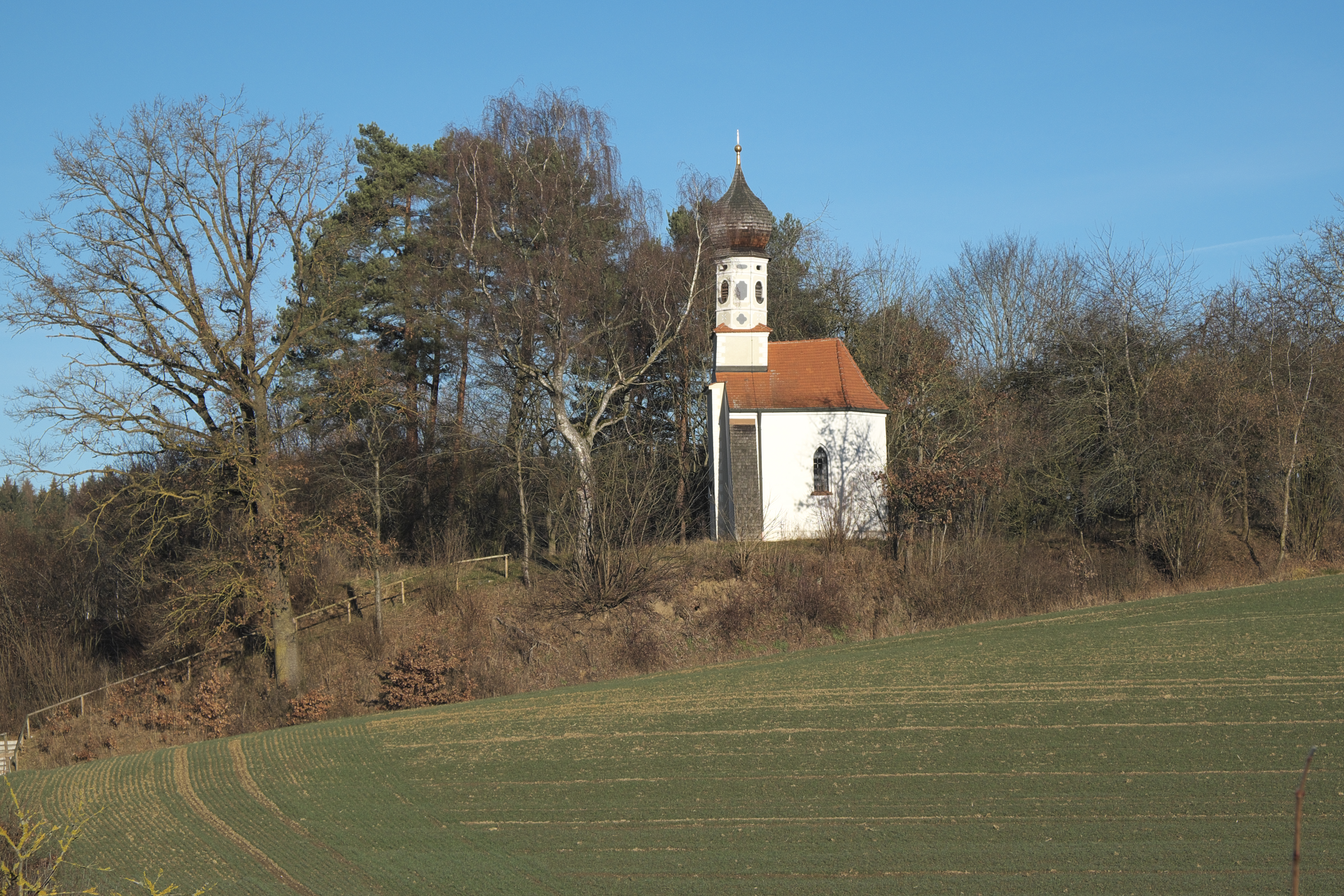 Katholische Filialkirche St. Georg in Pelka, einem Ortsteil von Hohenkammer im Landkreis Freising (Bayern/Deutschland)